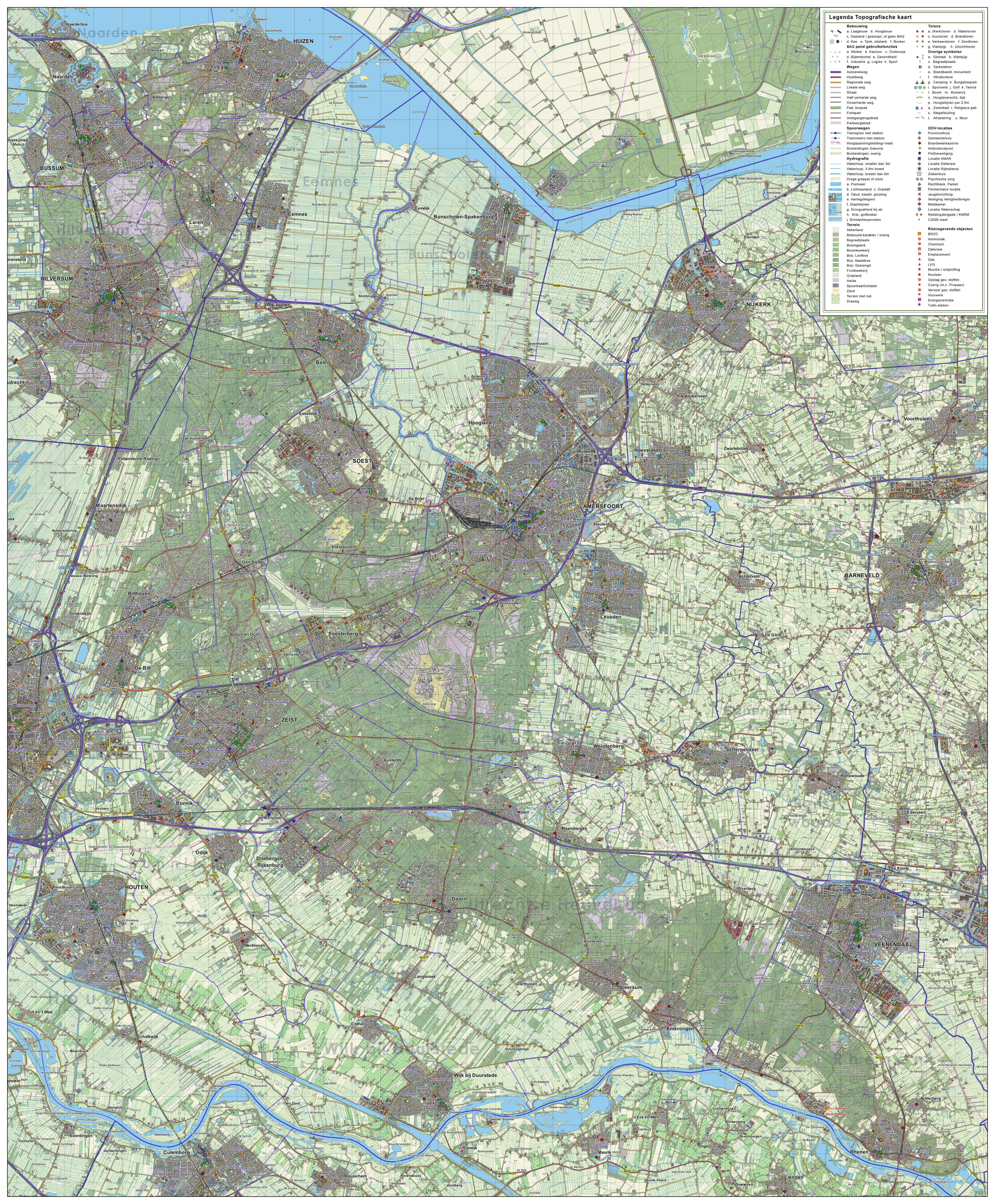 Topografisch beeld van het gebied "De Utrechtse Heuvelrug". Op basis van de GML open geodata van de BRT/Top10NL (basisregistratie Topografie, Kadaster 2011), vrijgegeven door Kadaster onder de Creative Commons BY licentie. Samenstelling en kleurenschema: Jan-Willem van Aalst, met QuantumGIS en Photoshop.